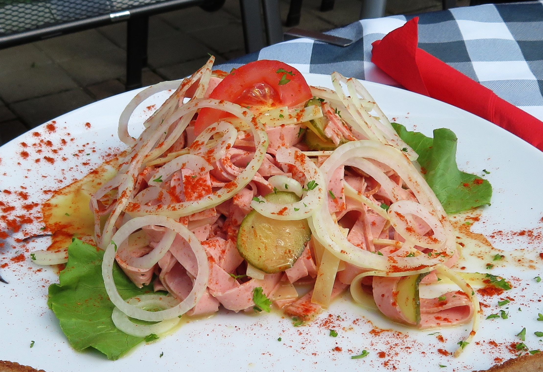 Wurstsalat mit Käse